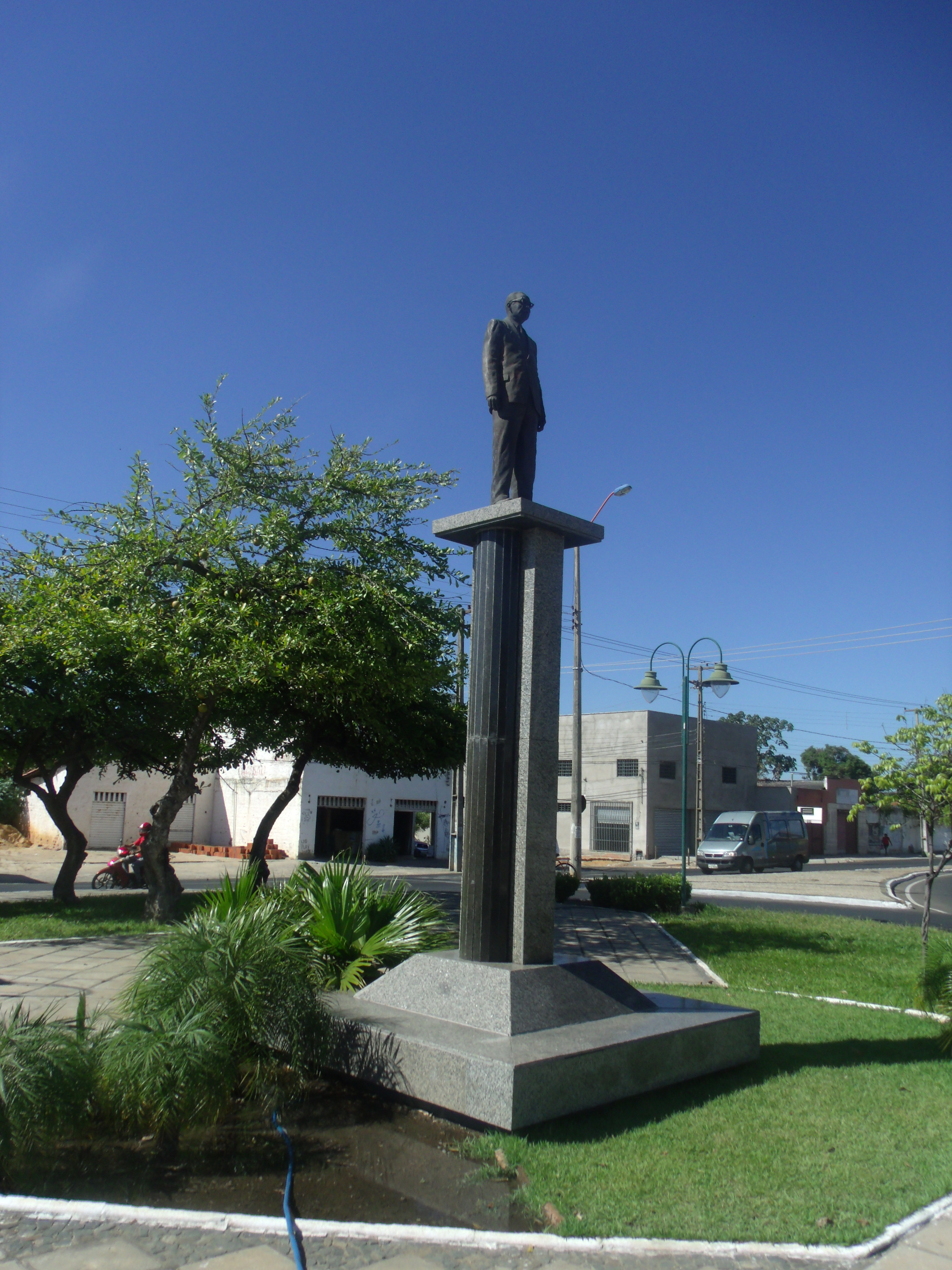 Estátua do professor Walter Alencar, o fundador da Tv Clube, numa avenida de Teresina.